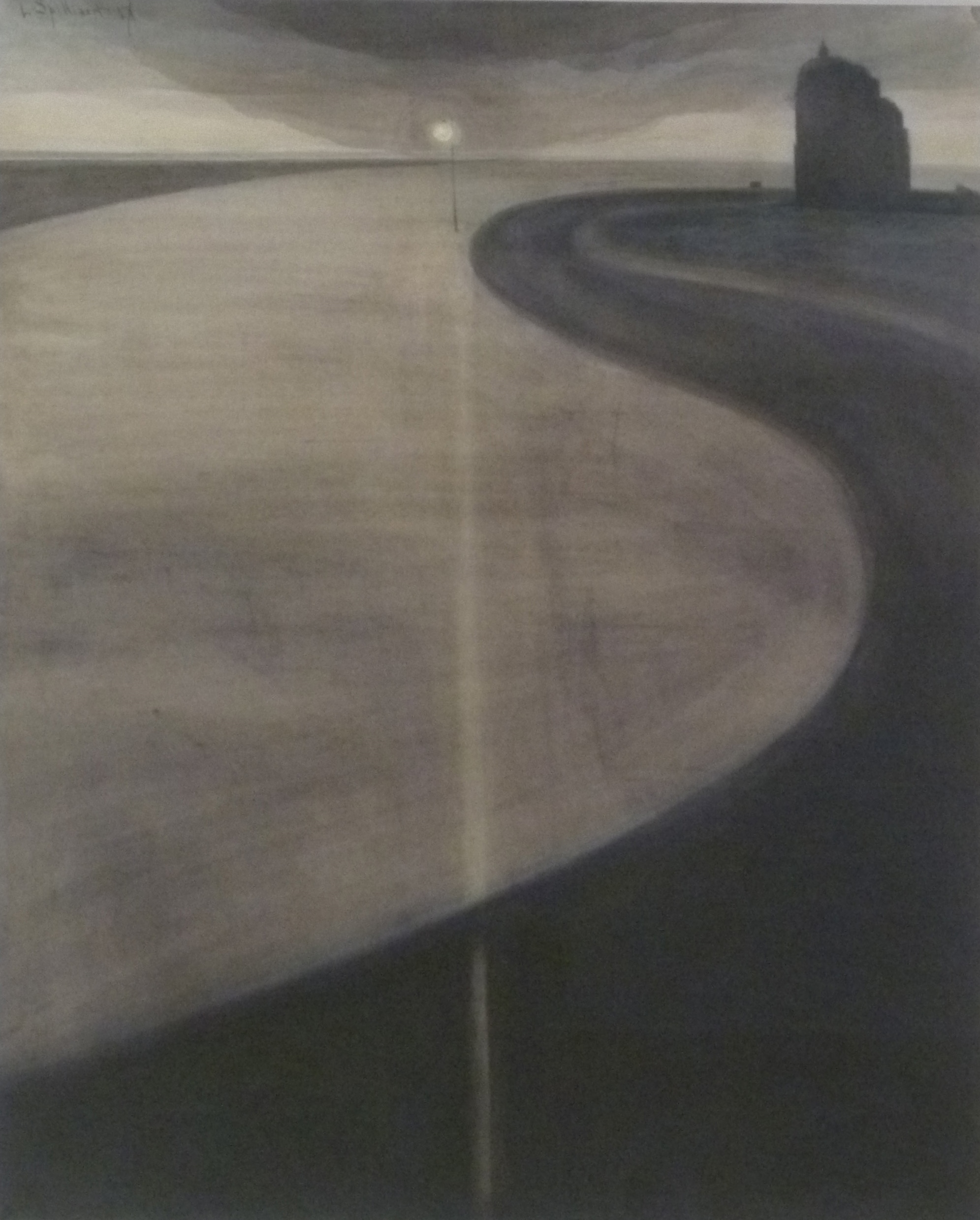 "De bocht van de dijk" (1907), gewassen Oost-Indische inkt, penseel, pen en kleurpotlood op papier (514 x 411 mm) door de Belgische kunstenaar Léon Spilliaert; privébezit